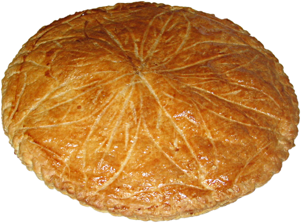 Galette des Rois Parisienne